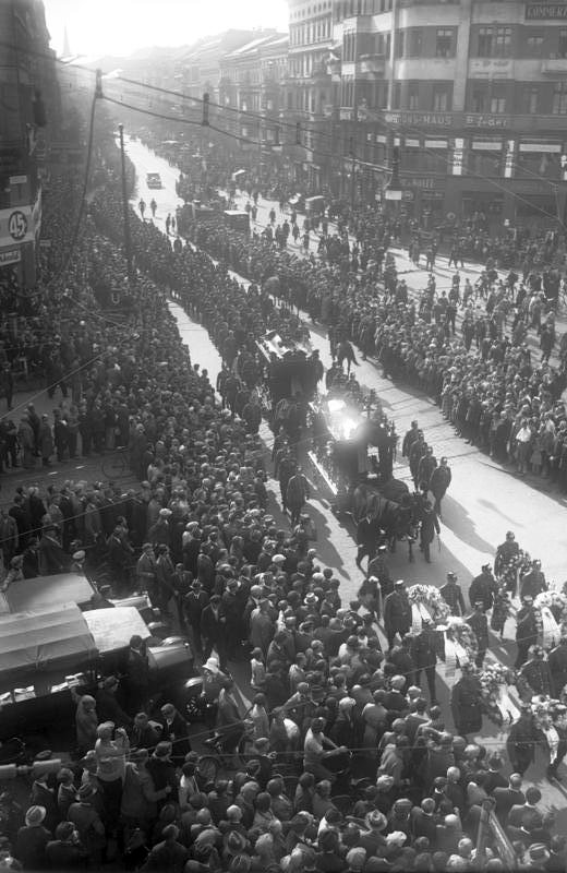 Die feierliche Beisetzung der ermordeten Schupo-Offiziere in Berlin! Unter ungeheurer Beteiligung der Bevölkerung bewegt sich der feierliche Trauerzug über den Oranienburger Platz in Berlin.